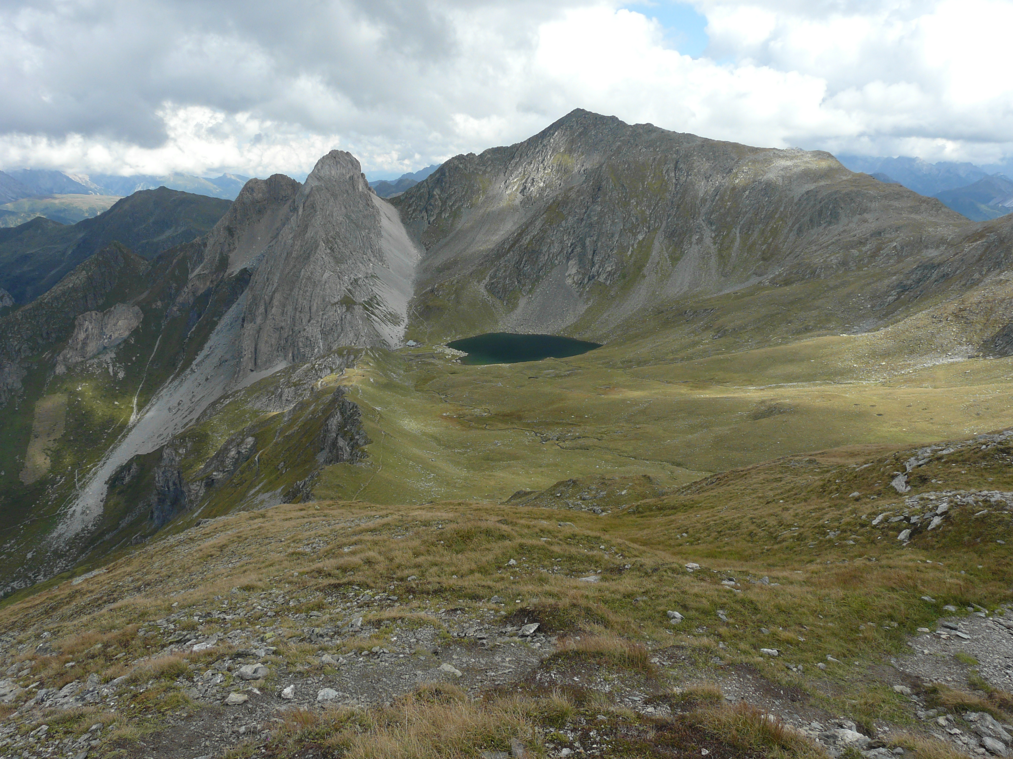 Der Talkessel des Obstansersees in den Karnischen Alpen. Links der Rosskopf (2603 m), das Rosskopftörl (2493m) und rechts die Pfannspitze (2678m). Am See die Obstansersee-Hütte. Blick von Westen.